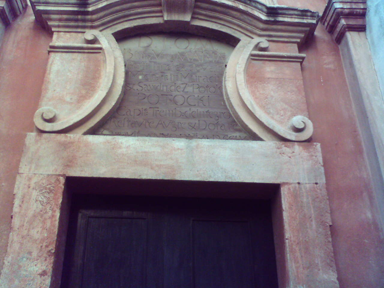 Фундаційна таблиця, колишній костел домініканів, Кам'янець на Поділлі